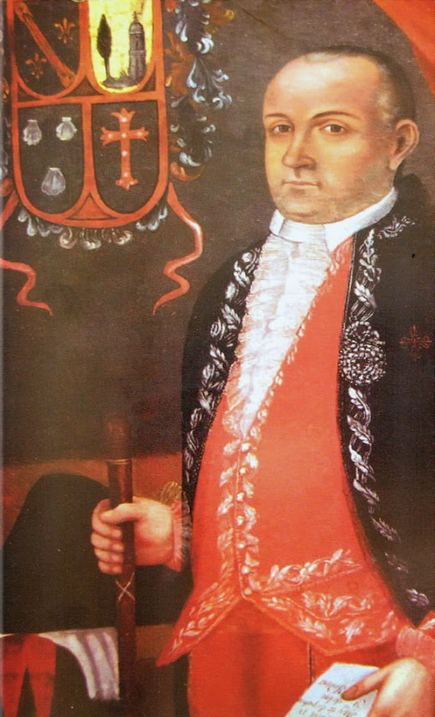 Sebastián de Segurola y Oliden. Óleo de autor anónimo que se conserva en el Museo de La Paz, Bolivia.